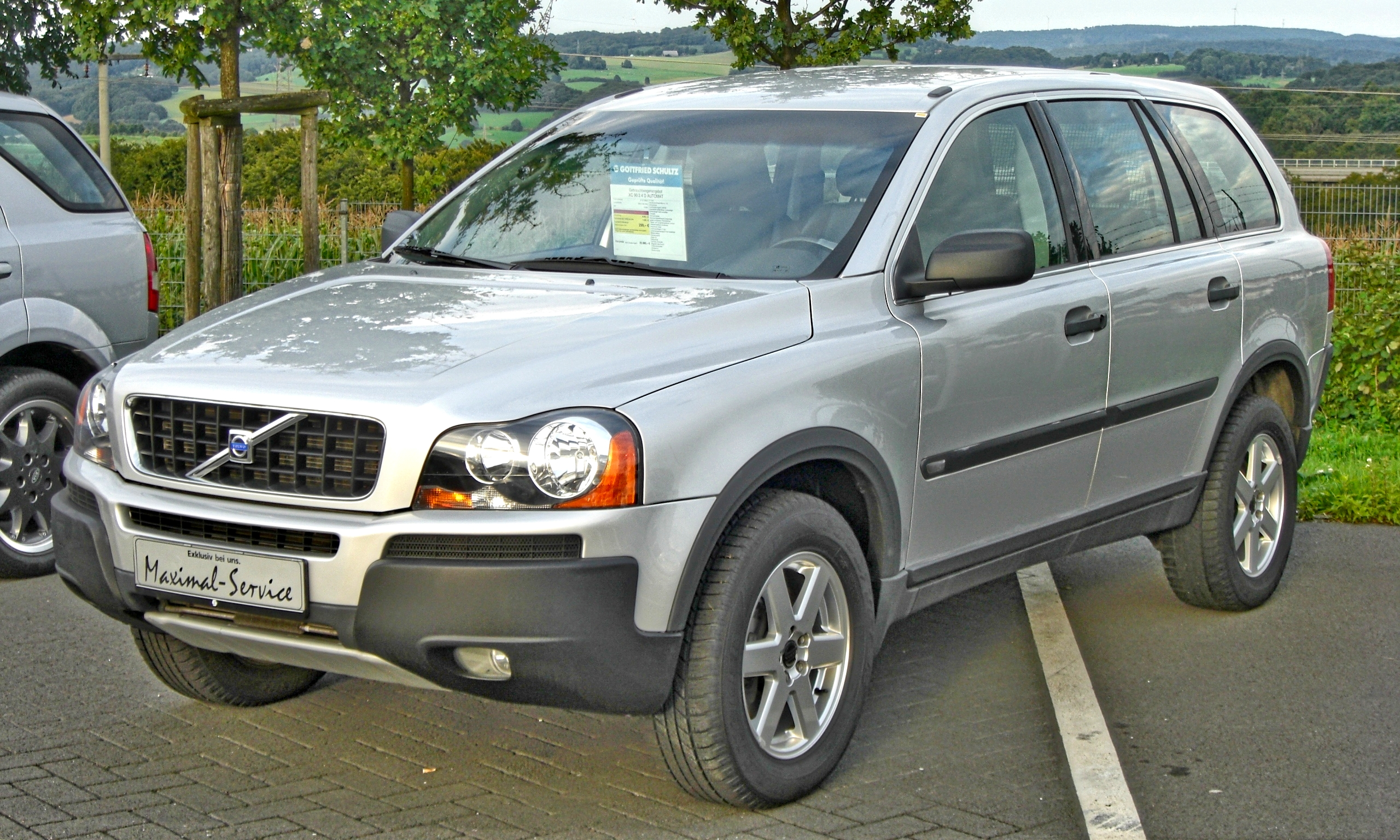 Volvo XC90